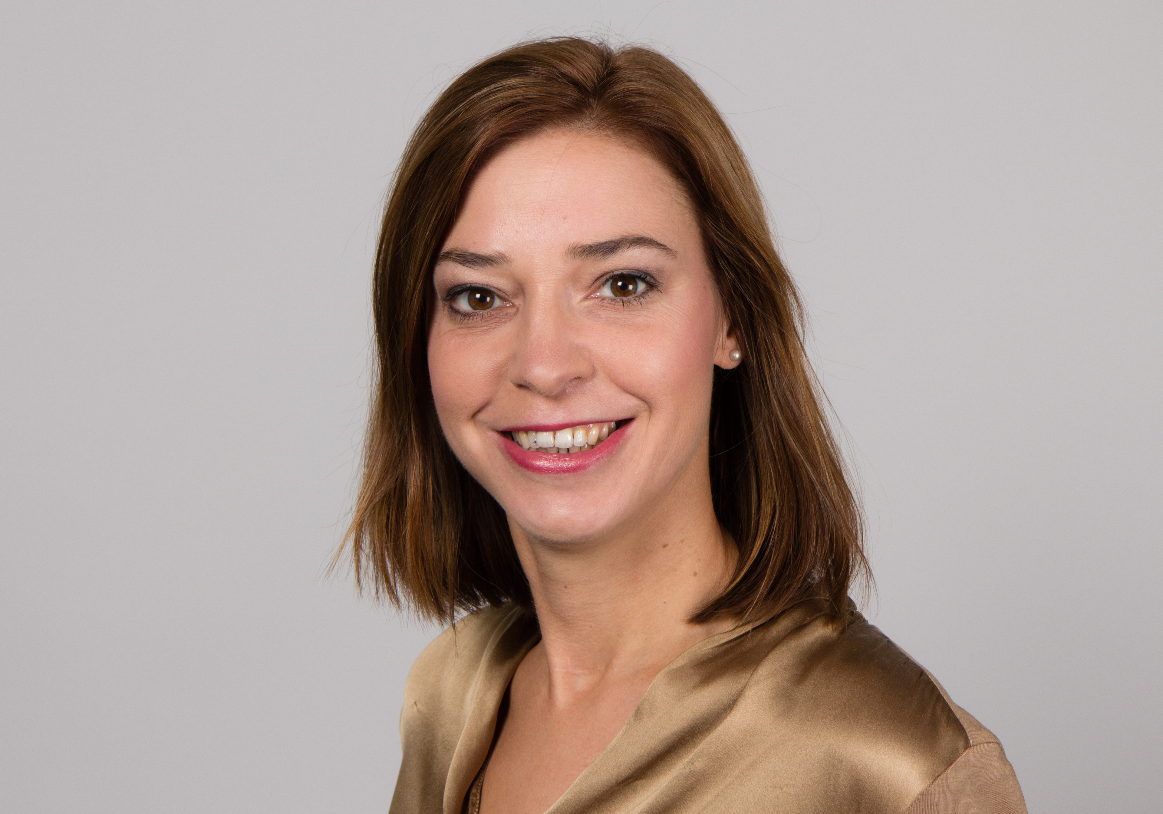 Yvonne Magwas (* 28. November 1979 in Rodewisch) ist eine deutsche Politikerin (CDU). Wikipedia-Bundestagsprojekt 2014 8–12 September 2014 in BerlinThis file was taken during the project “Wiki loves parliaments/Bundestag 2014” (German). Organisation: Martin Rulsch, Olaf KosinskyDesign: Martin KraftPhotography: Foto-AG Gymnasium Melle (Jan-Kristof Blömke, Lukas Eismann, Moritz Kosinsky, Laura Lessing, Karsten Mosebach, Mascha Mosebach, Teresa Schreer, Noah Sewöster, Niklas Tschöpe), Olaf Kosinsky, Martin Kraft, Harald Krichel, Steffen Prößdorf, Ralf Roletschek, Martin Rulsch, Gerd Seidel, Sven TeschkeVideo: Marc Rudnick, Manuel SchneiderEditors: Marcus Cyron, Günter Fremuth, Martin Kraft, Robin Krahl, Harald Krichel, Martin Rulsch, WikiAnikaReception: DasMonstaaa, Leonie Rabea Große, Lutheraner, Nina Möllering, Martin Rulsch, WikiAnika, Foto-AG Gymnasium MelleCosmetics: Regina Bosak, Bettina Dieguez, Sandra Kobbe, Andrea Strehlke; Irada Abdullayeva, Vivien Abelmann, Olena Engelbrecht, Sarah Fabini, Nina Magnus, Jacqueline Schmidt, Leonie Taboada, Julia Willer Usage information If you need more information how to use this file, please send an email to . Personality rights warningAlthough this work is freely licensed or in the public domain, the person(s) shown may have rights that legally restrict certain re-uses unless those depicted consent to such uses. In these cases, a model release or other evidence of consent could protect you from infringement claims.